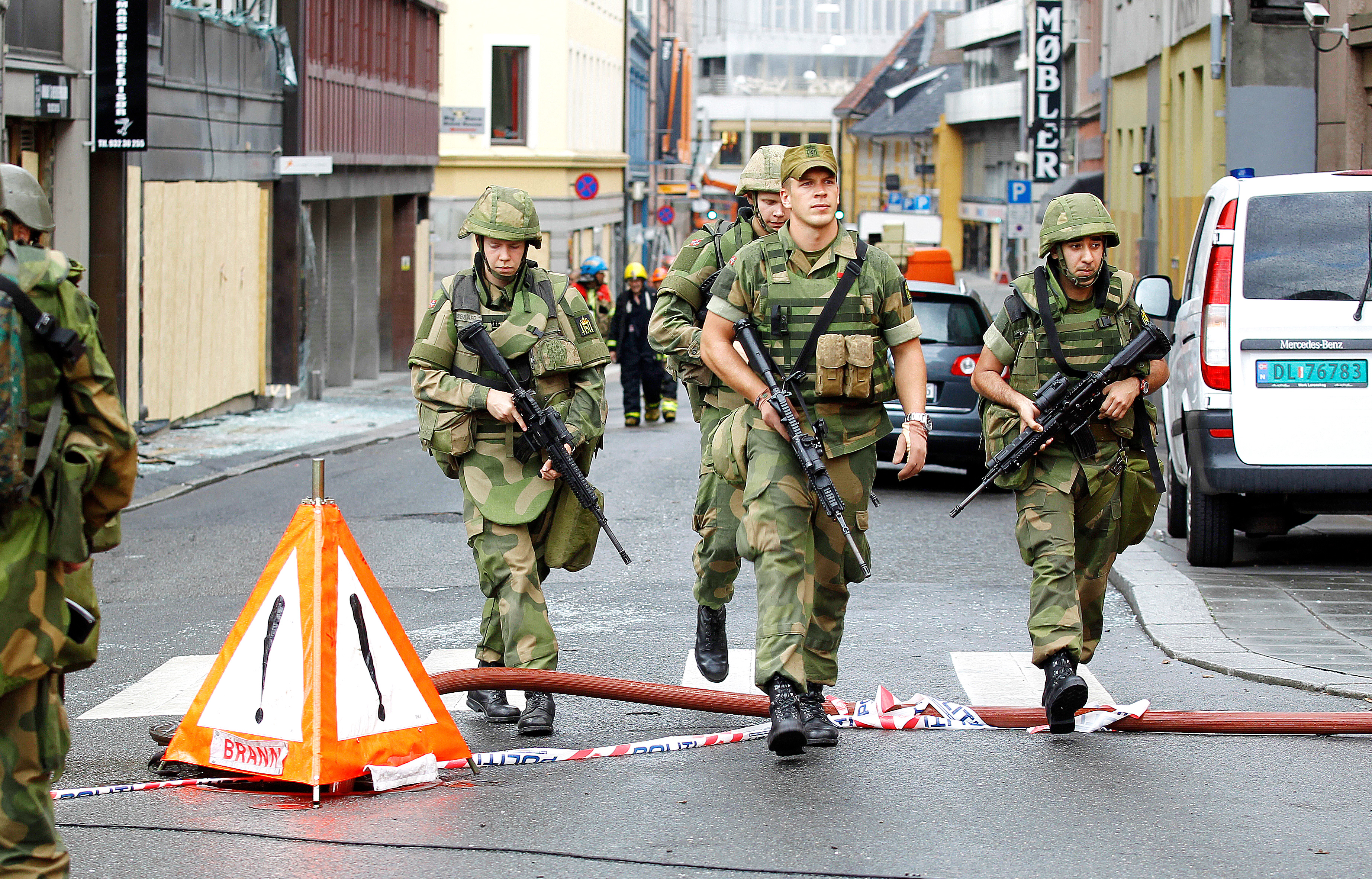 Væpnede gardister i Regjeringskvartalet etter at terrorbomben gikk av.